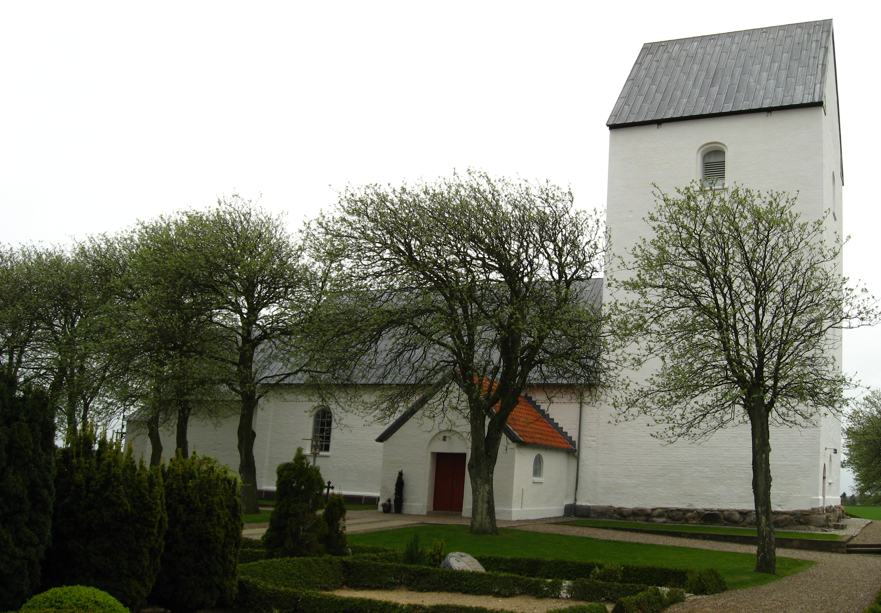 Bindslev Kirke, Hjørring Kommune